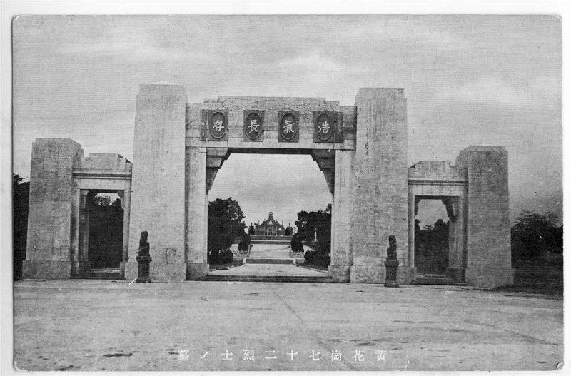 1940年代，廣州市黃花崗七十二烈士墓正門。